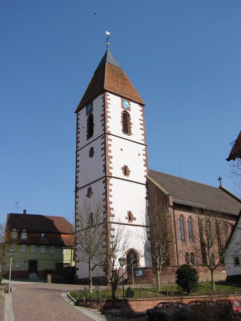 Turm und Saalkirche Ebhausen